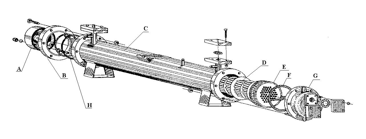 Prikaz izgleda cijevnog rashladnika = Shell type heat exchanger - design and main parts